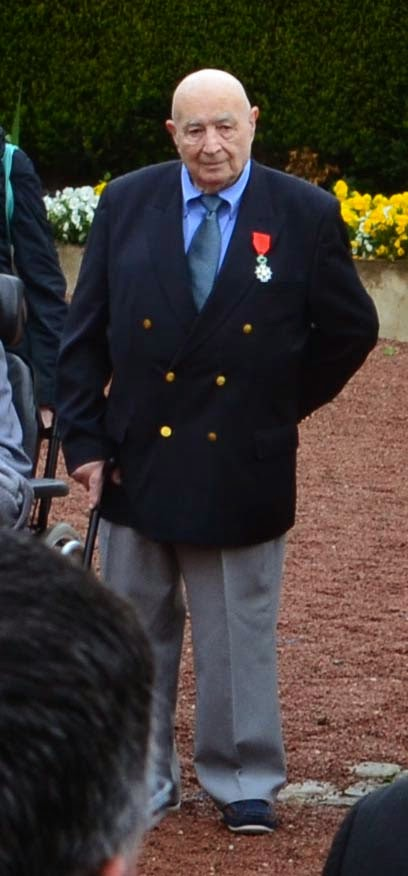 Lors de la remise de sa légion d'honneur en Mai 2015